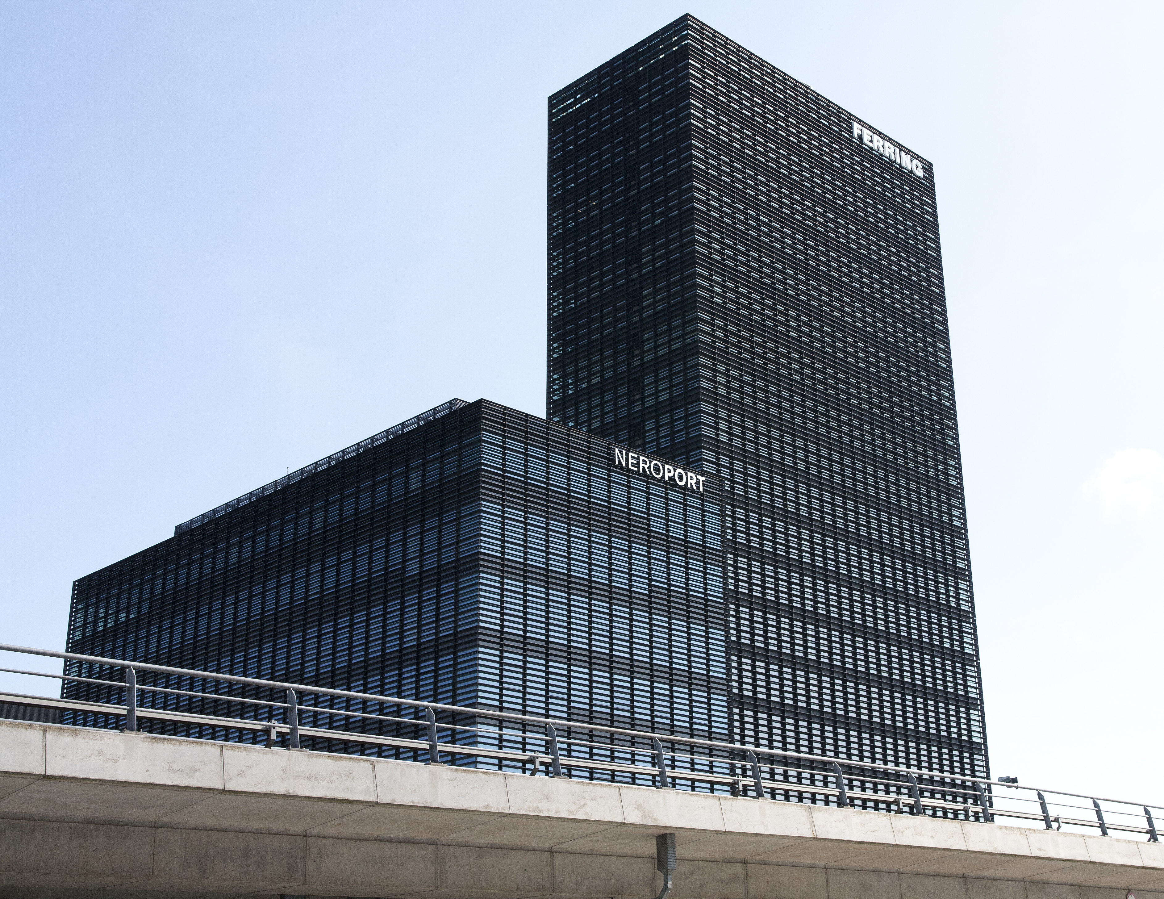 Ferring Neroport Ørestad, København - 2010-08-10.